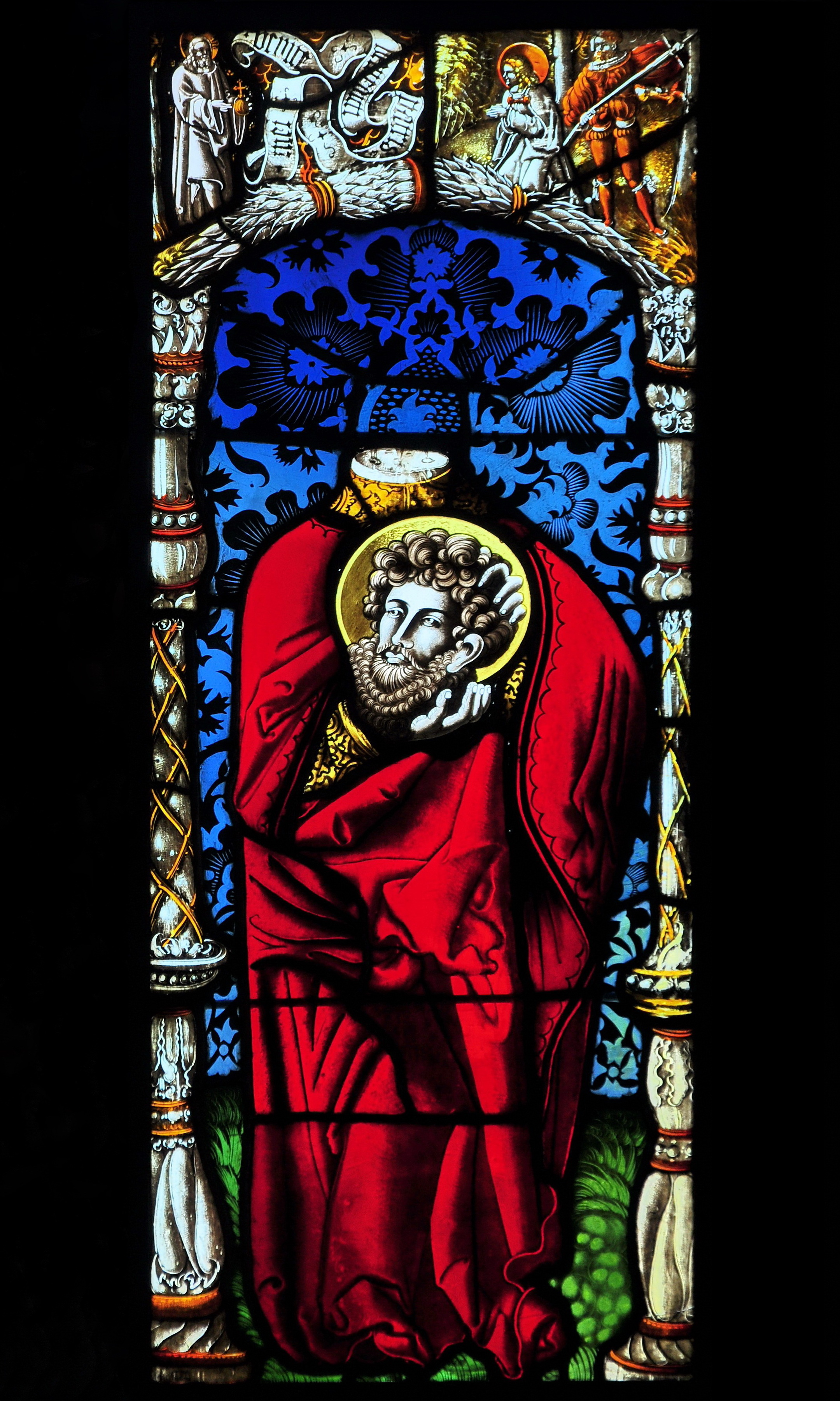 Reformierte Kirche mit Pfarrhaus, Lindenplatz in Elgg (Switzerland) : Exuperantius